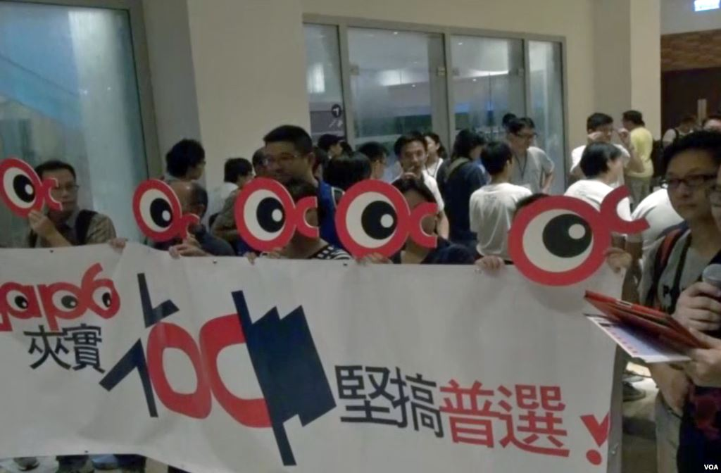 香港抗議者啟動佔領中環運動